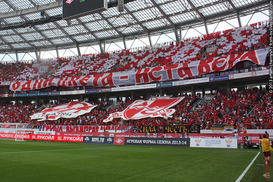 Перфоманс, посвящённый дружбе с болельщикам "Црвены Звезды"